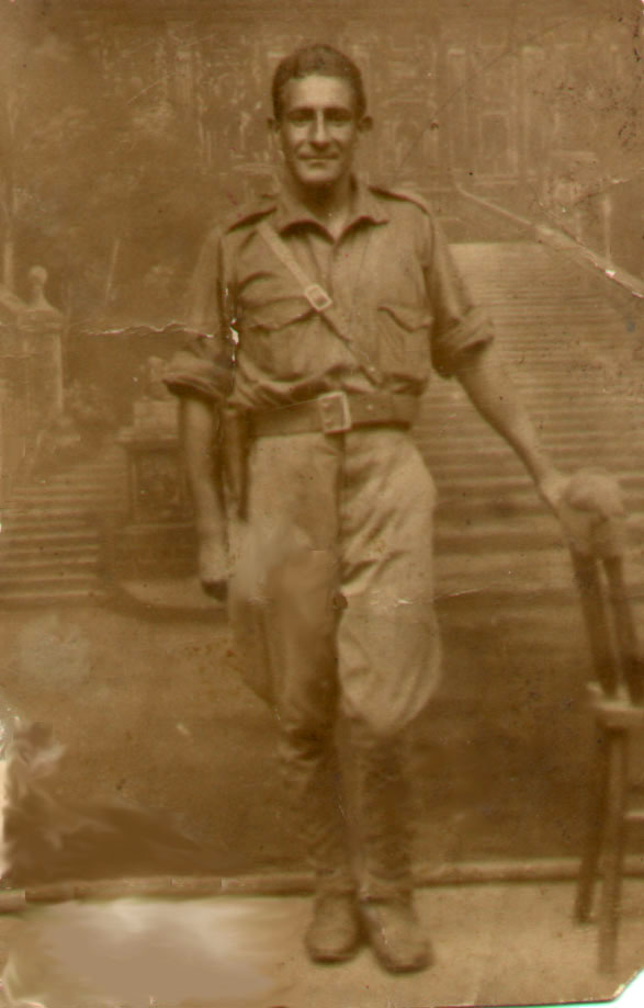 Recluta J. S. Vilar (30 años, casado y con un hijo), la quinta del 28 llamada a filas en el verano del 1938 .